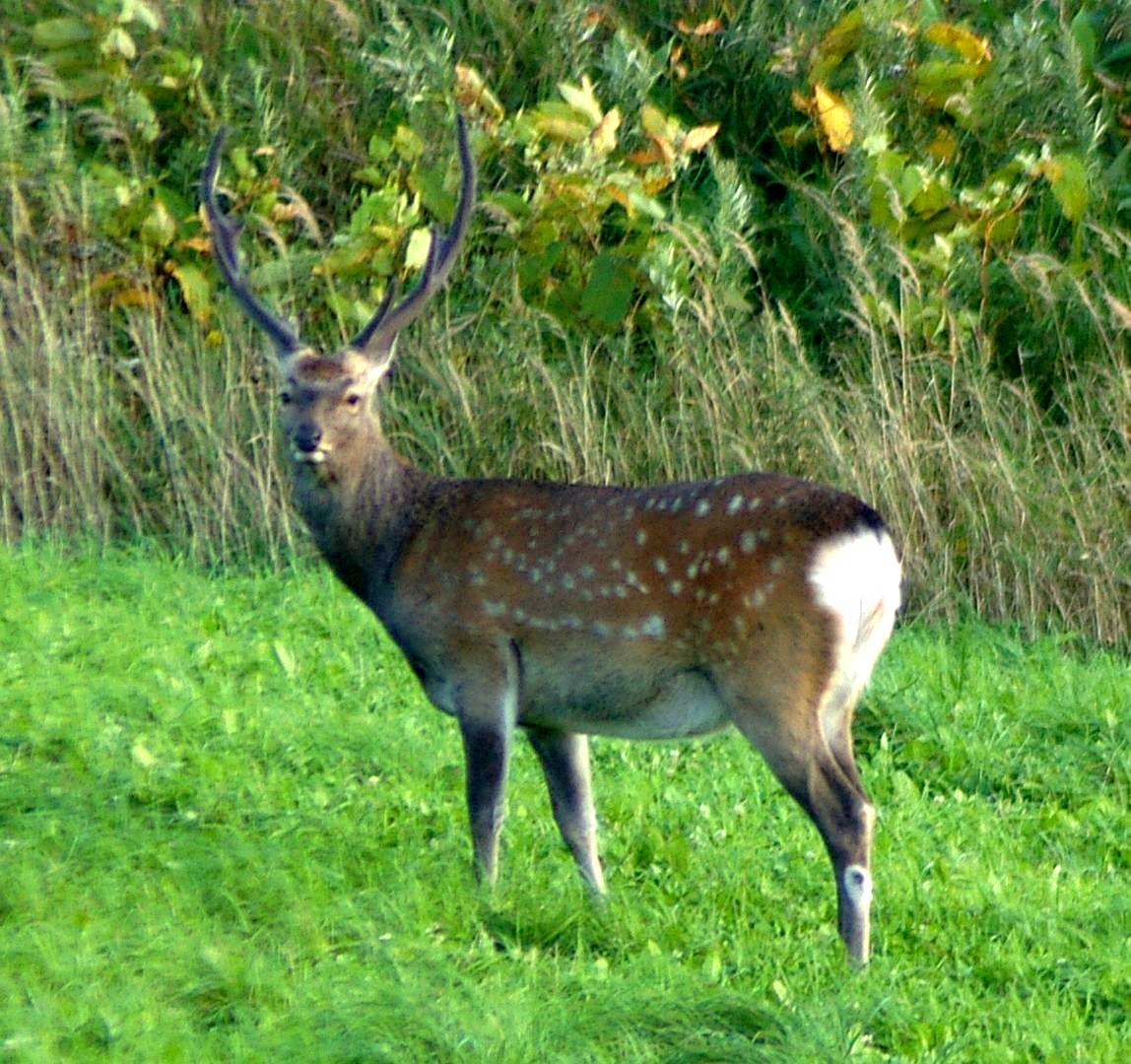 C.n.yesoensis (Ezo shika in Japanese) date: 12 Sep 2006 place: Wakkanai, Hokkaido